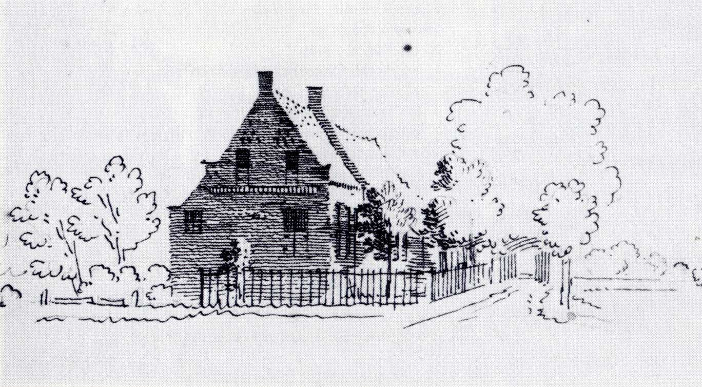 Van Benthemhuis in de Havelte in 1732